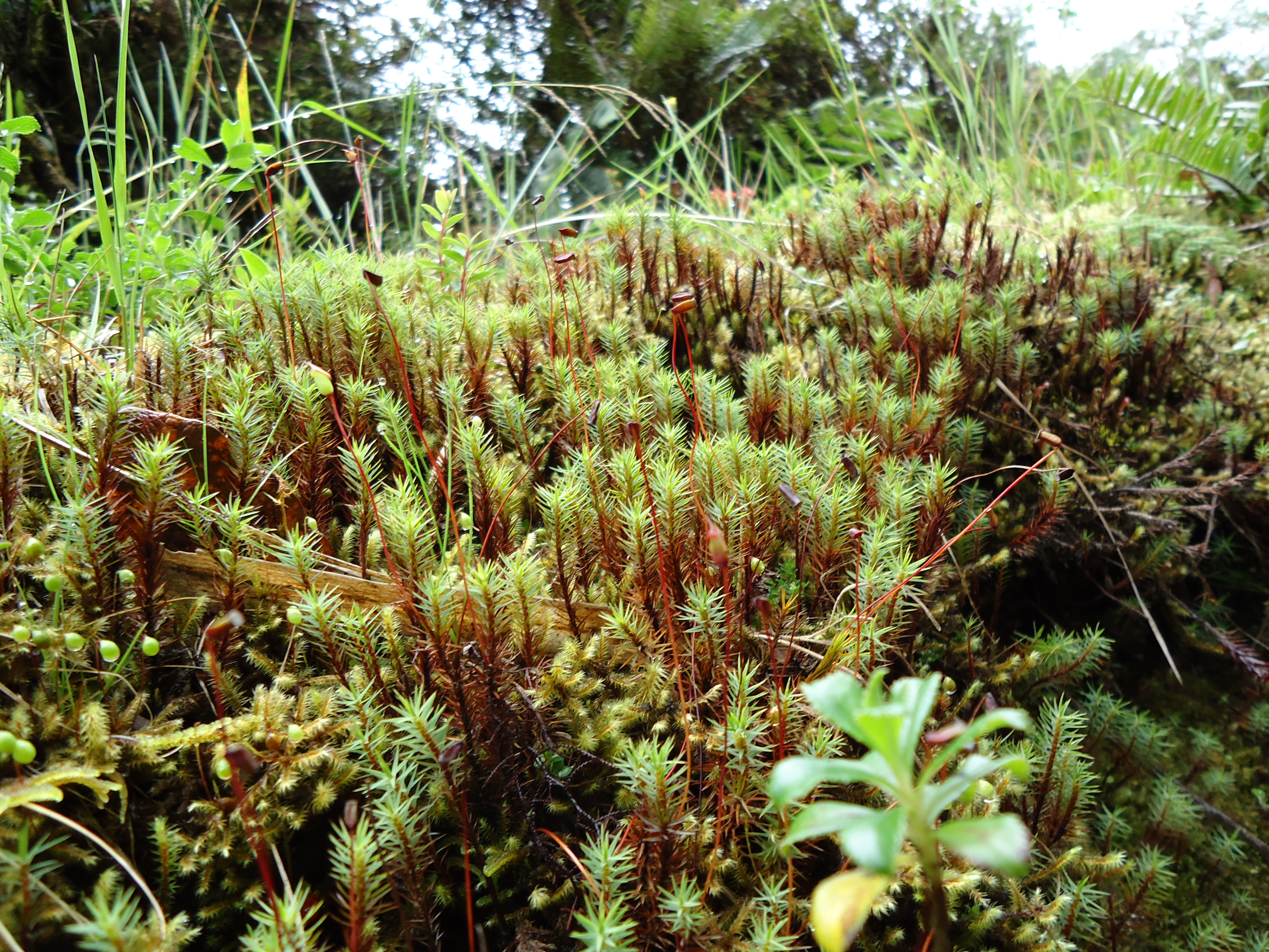 Polytrichaceae indet. Vegetación de tamaño reducido in Costa Rica